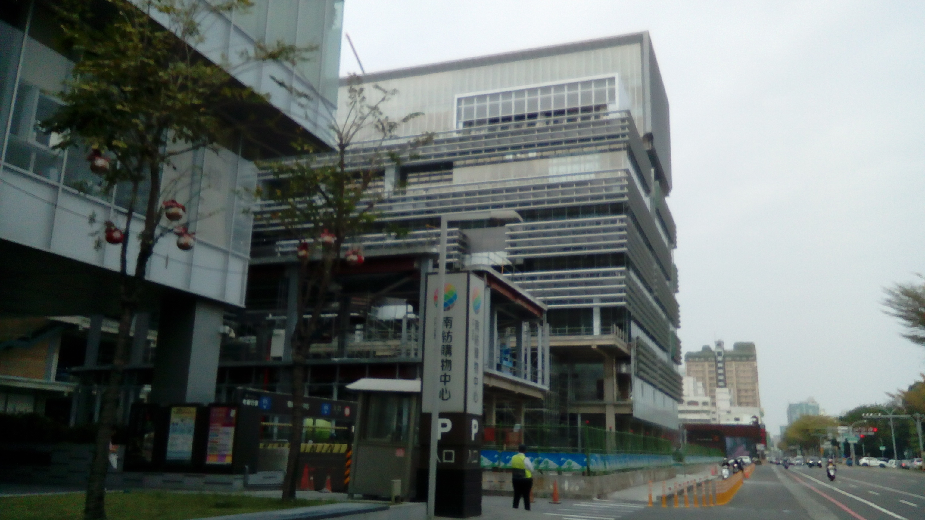 位於台南市東區台一線(中華東路)上 南紡一期北側